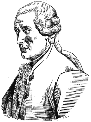 Sujet : Portrait de Vaucanson Source : La Magasin pittoresque de 1833 Licence : Licence GFDL. Auteur : Utilisateur:Valérie75